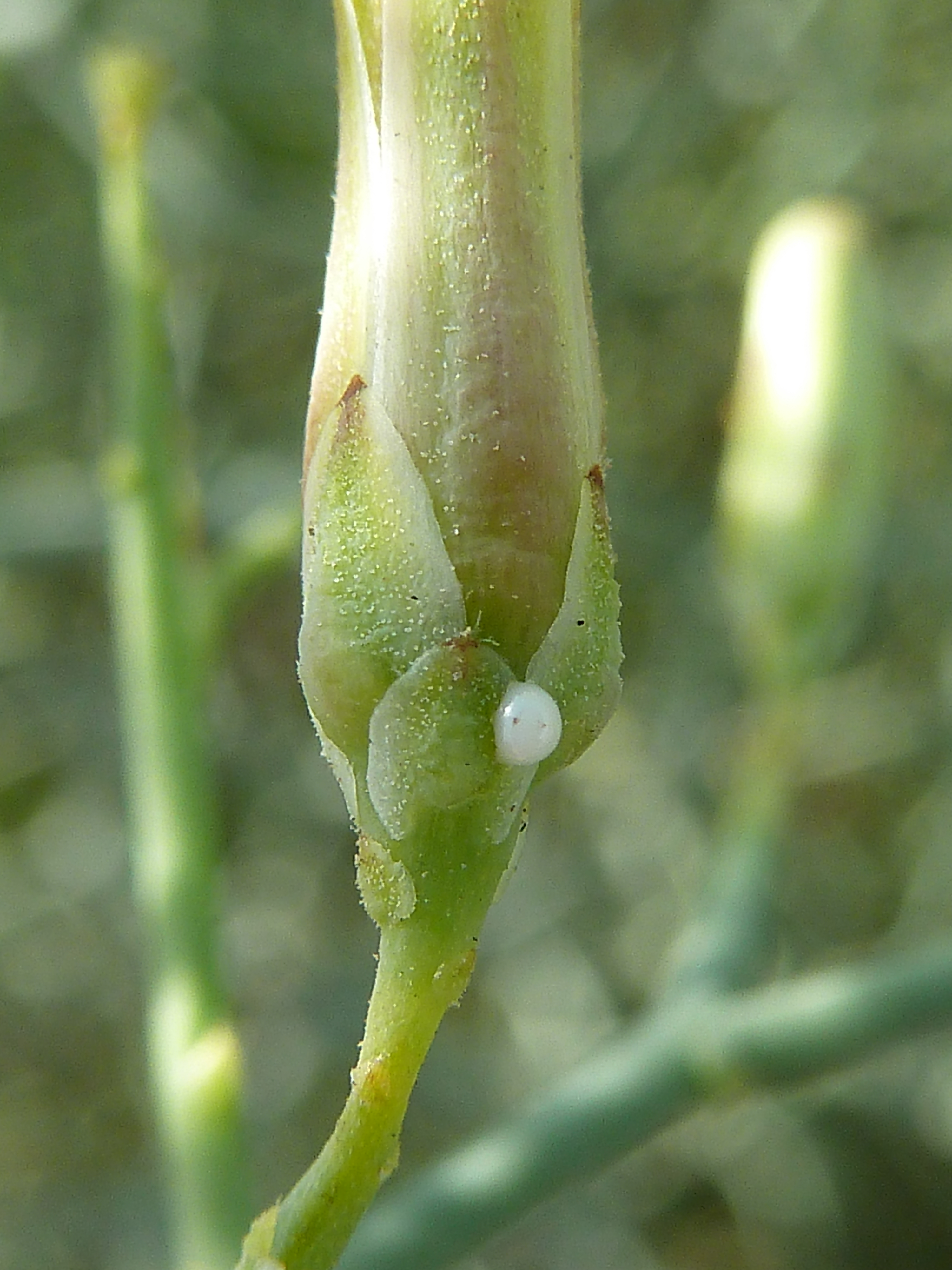 Launaea arborescens (Aulaga morisca) - Brácteas involucrales externas con una exudación de látex. - Descampado circa Circumvalación Norte, Águilas (Provincia de Murcia, España).